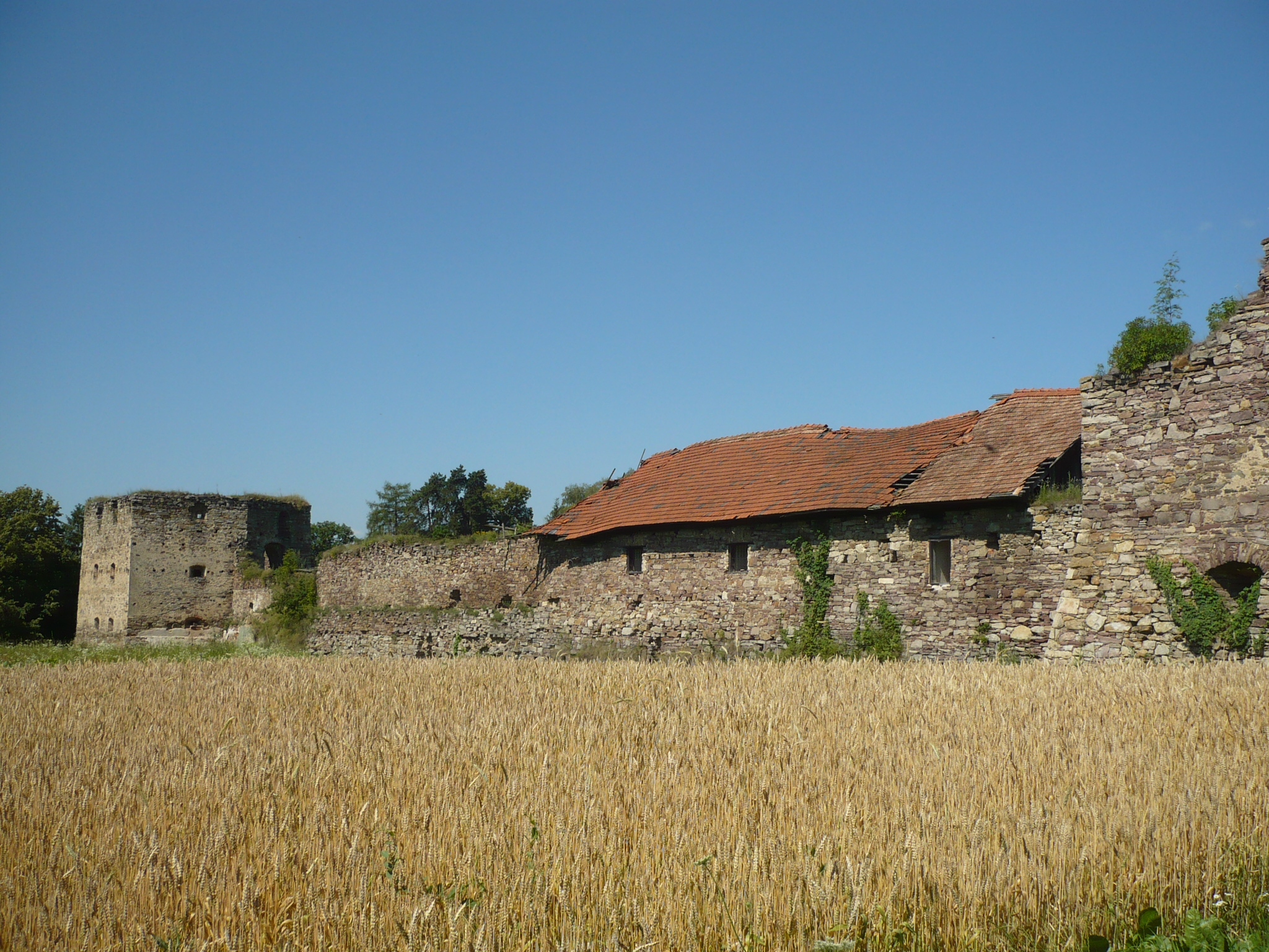 Potok Złoty. Zamek